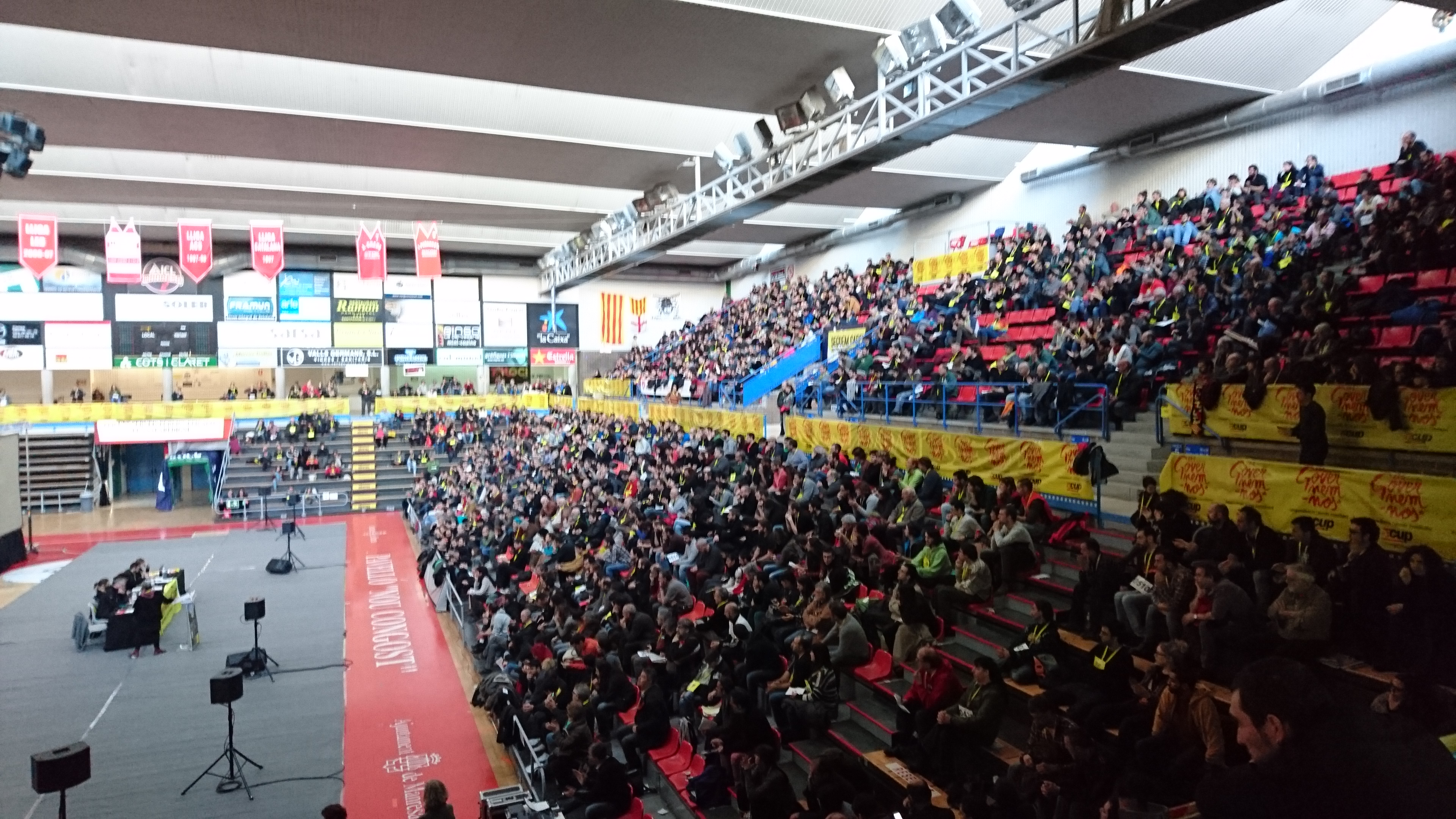 Debat intern de la Candidatura d'Unitat Popular sobre el possible pacte d'investidura amb Junts pel Sí, celebrat al Pavelló Nou Congost de Manresa (Bages) el 29 de novembre de 2015.